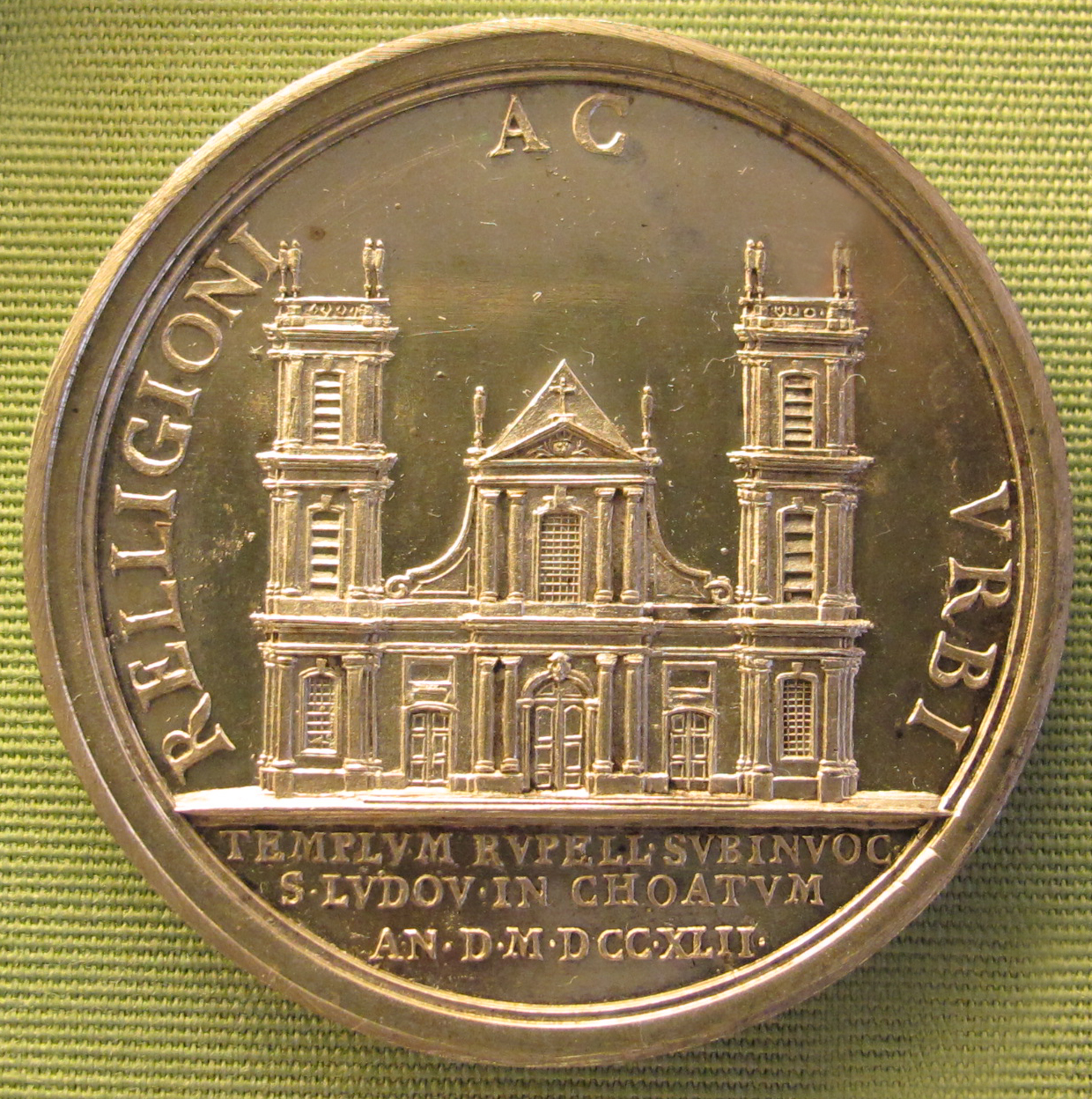 Ignoto, posa della prima pietra di st.denis de la rochelle, 1742